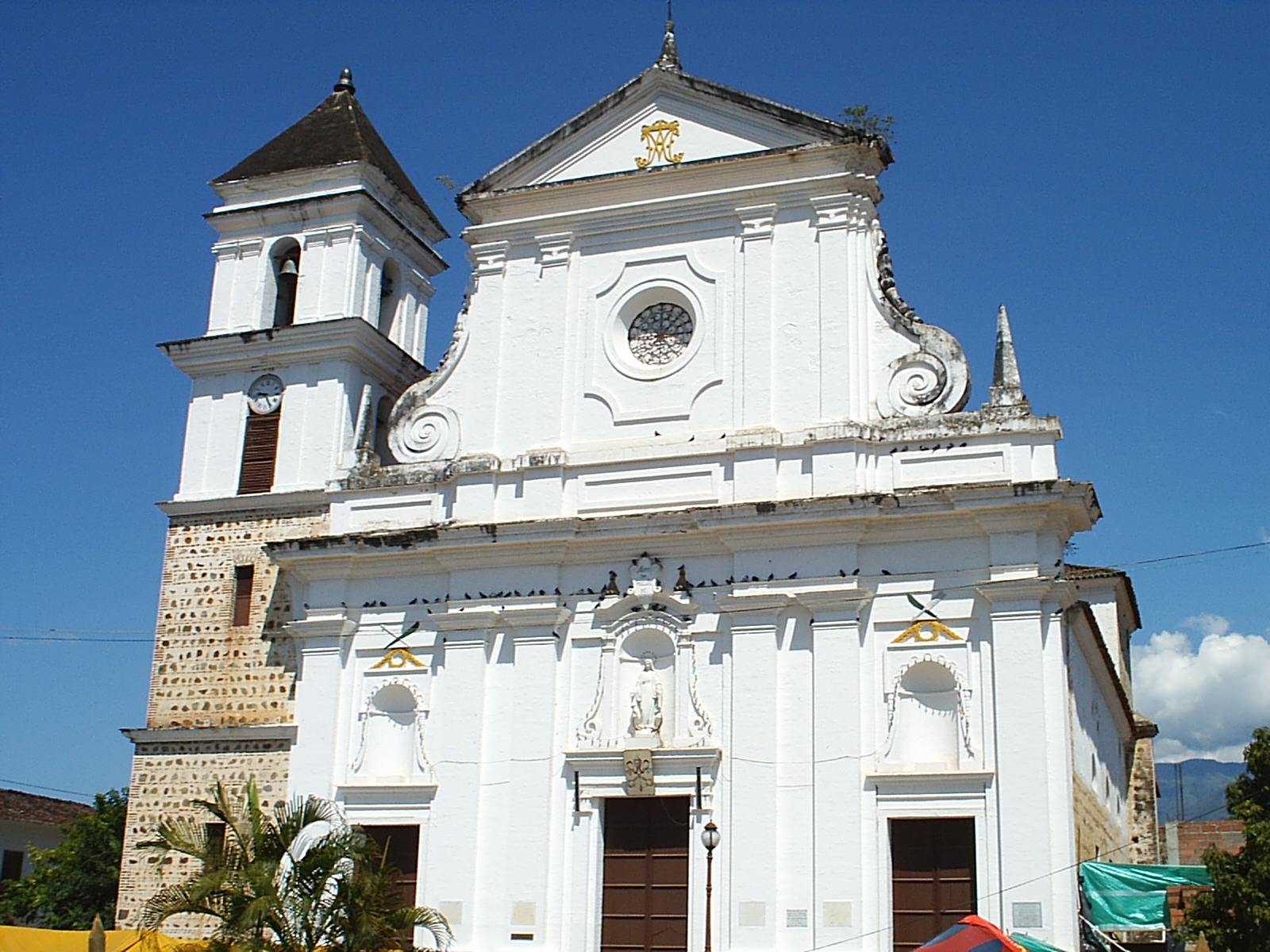 Sector Antiguo de la ciudad de Santa Fe de Antioquia